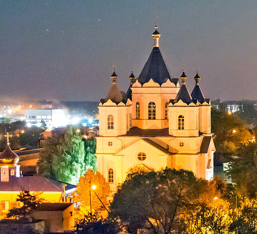 Джанкойский кафедральный собор в честь Покрова Пресвятой Богородицы в 2017 году